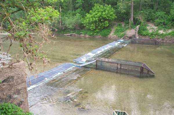 Fischwehr mit Reusenkästen an der Pielachmündung Vergleiche: [1]